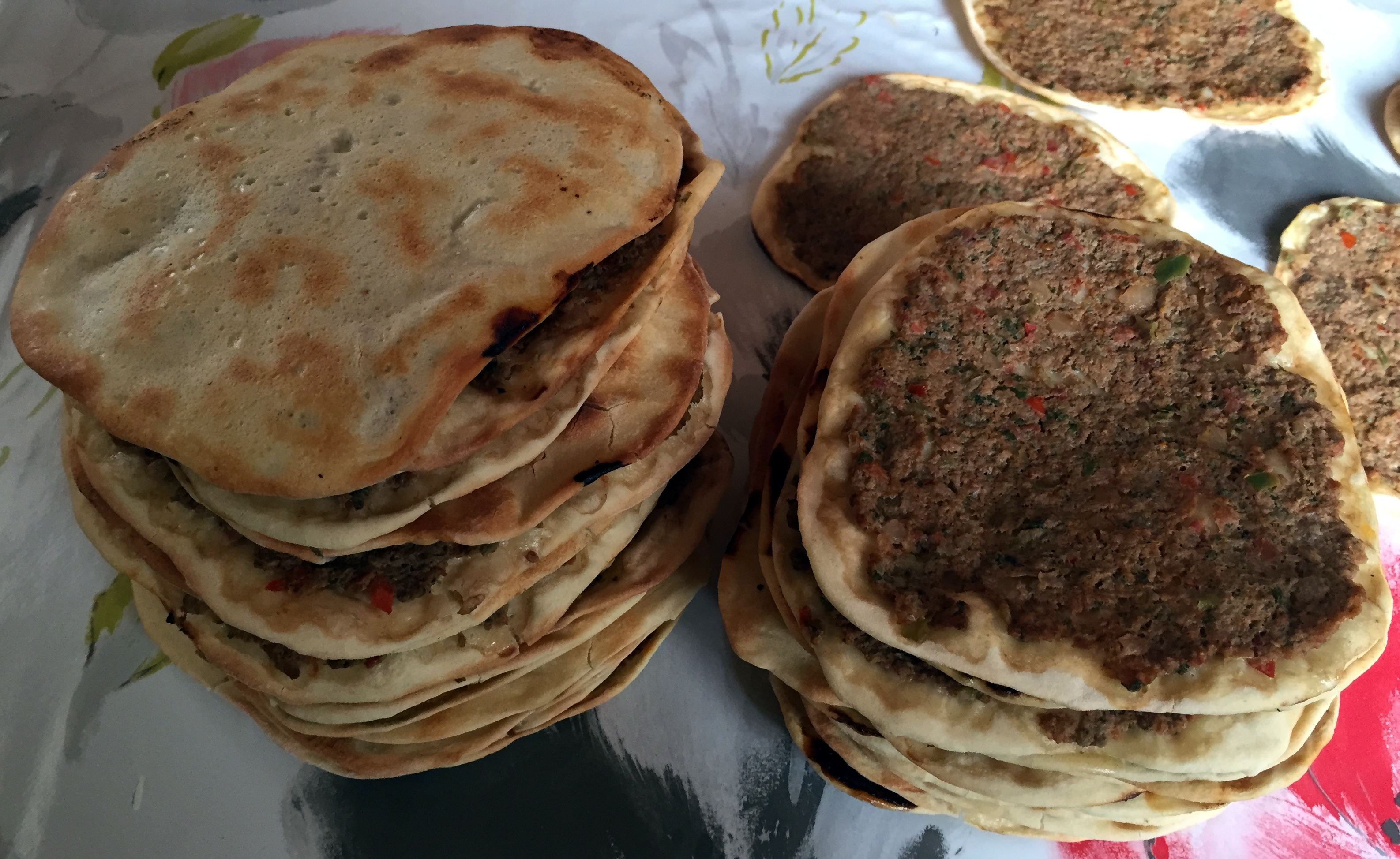 Des lahmajouns sortant du four.